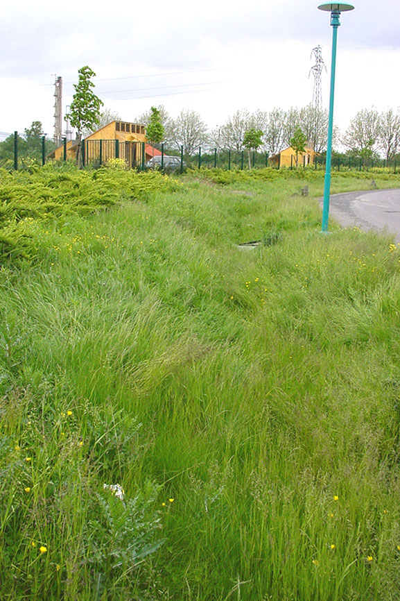 Dispositif de démonstration de l'association ADOPTA ; association Loi 1901 réunissant la ville de Douai, le Conseil régional du Nord Pas-de-Calais et l'Agence de l'eau Artois picardie, dédiée à l'expérimentation et à la prompotion de techniques alternatives de lutte contre les inondations et le ruissellement urbain. Cette "noue", sorte de fossé très élargi absorbe les pics de ruissellement dans envoyer l'eau vers l'aval où elle contribuait autrefois aux inondations. Elle s'infiltrera lentement dans le sol, en grande partie dépolluée par les plantes et les bactéries du sol.